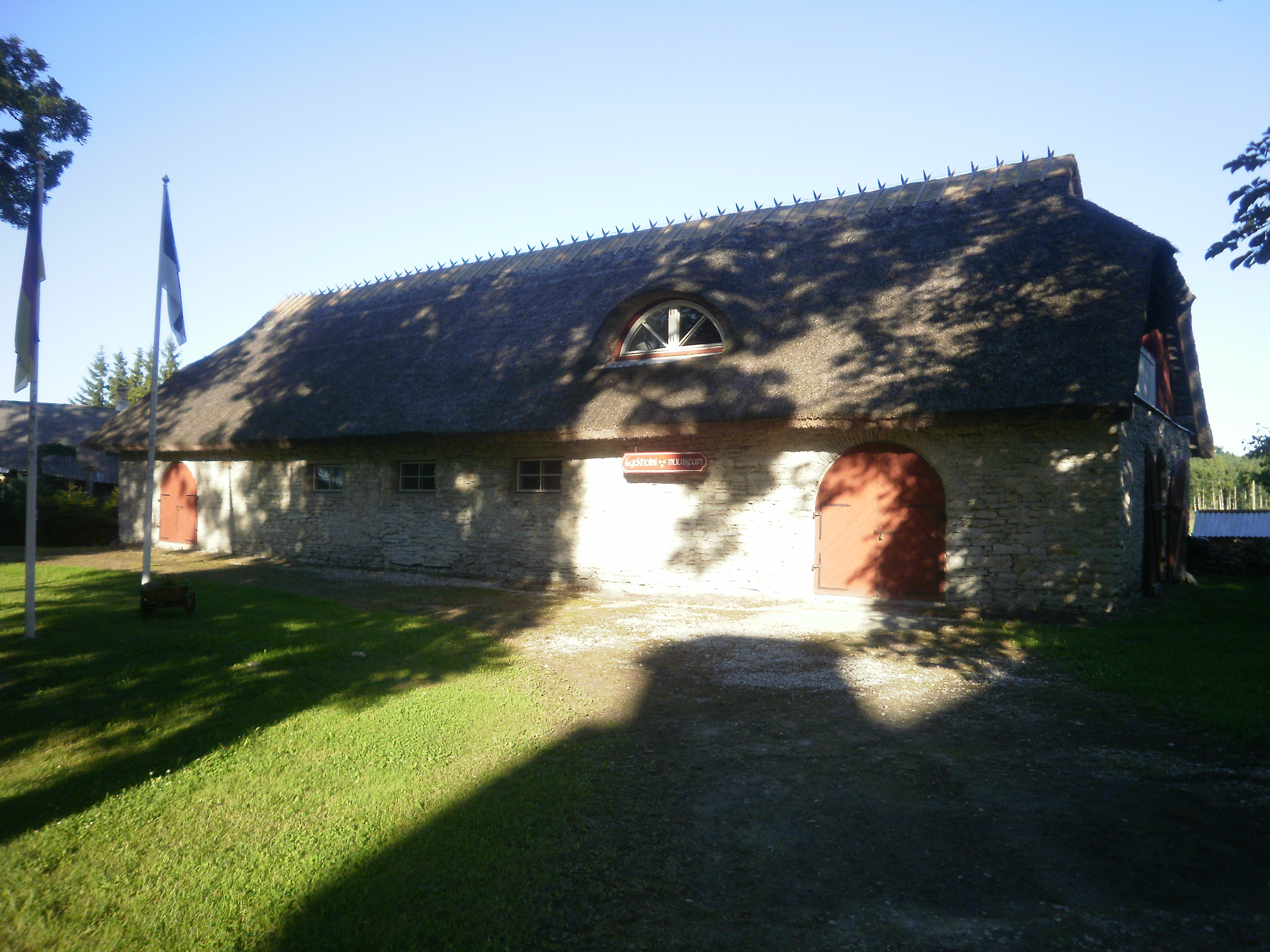 Lääne maakond, Noarootsi vald, Saare / Lyckholm küla Saaremõisa